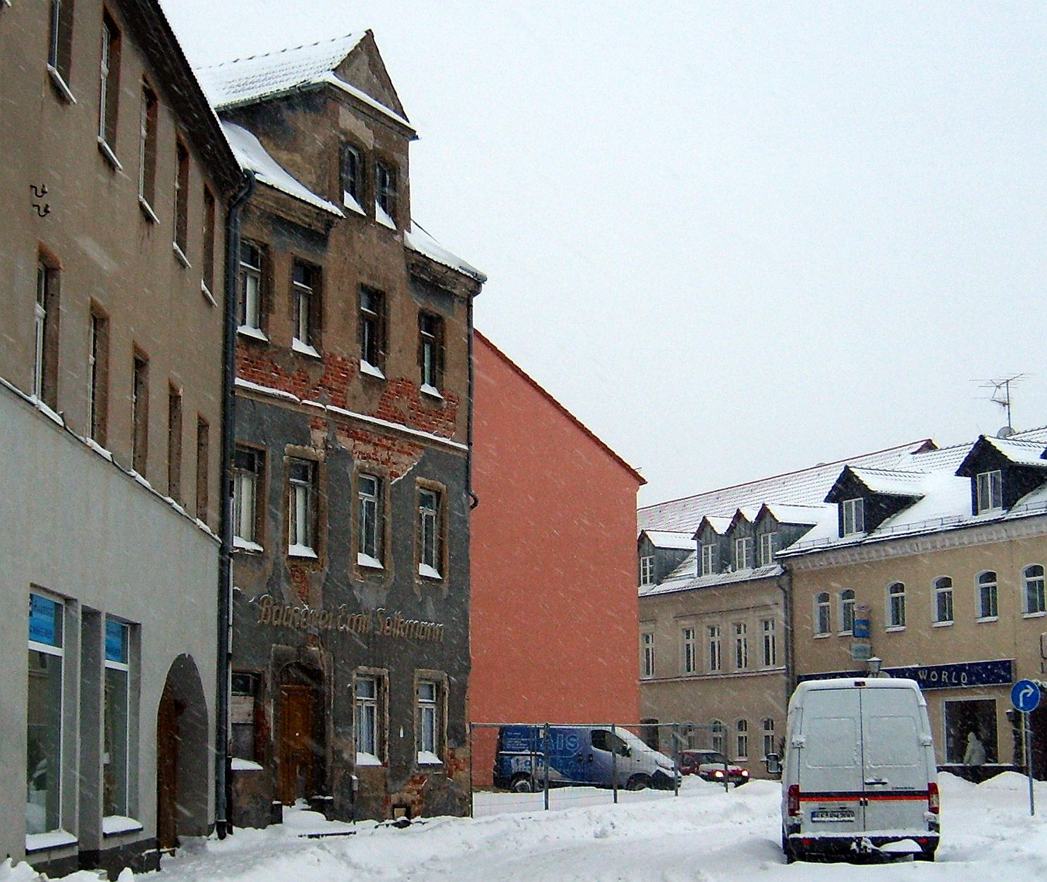 Das 2012 abgerissene Baudenkmal Bäckerei Selkmann in Elsterwerda.